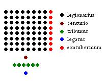 Egy centuria sematikus ábrája